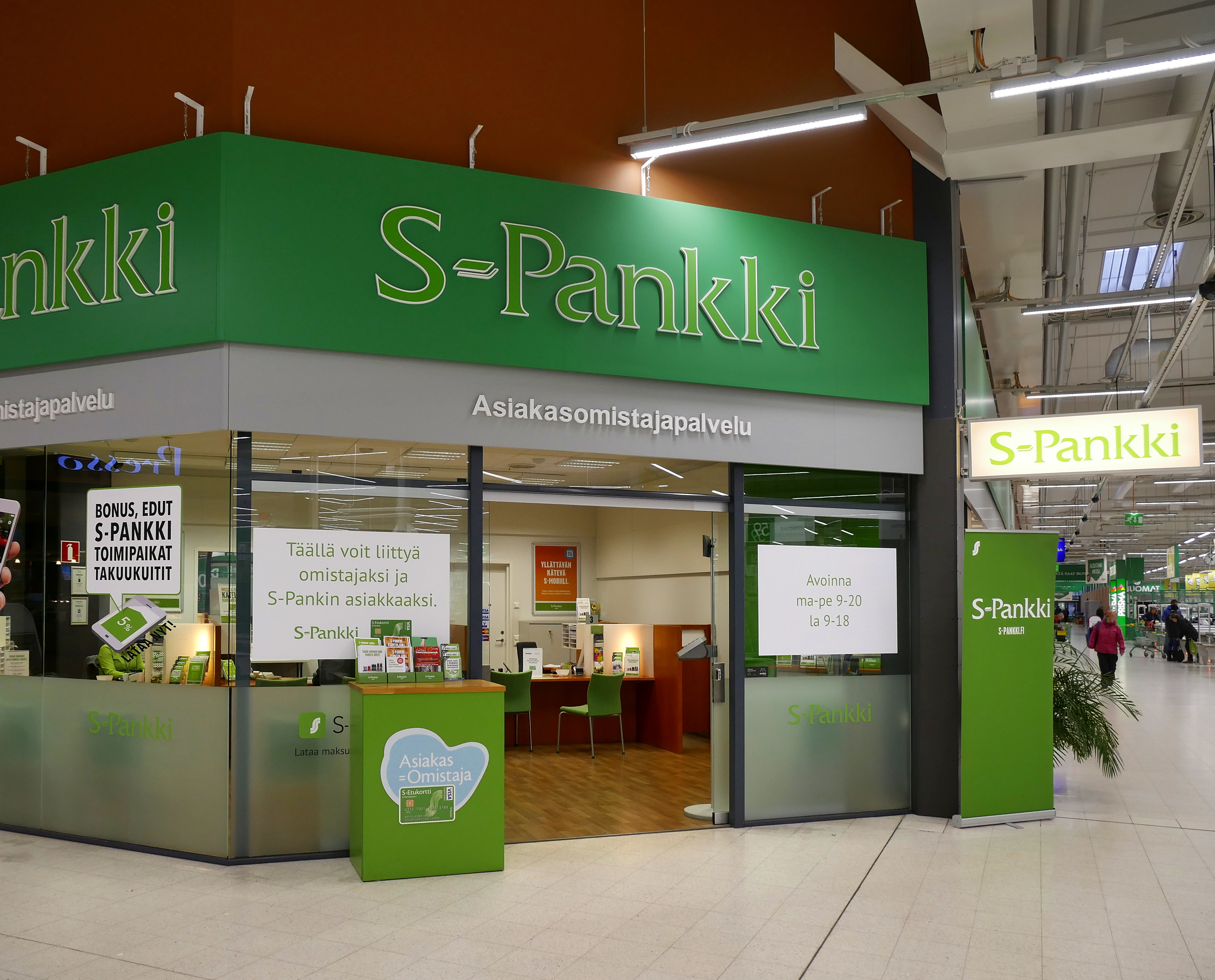 S-Pankki Seinäjoella Hyllykallion Prismassa.